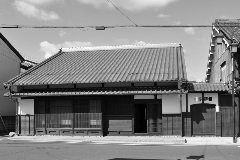 愛知県豊橋市二川町にある商家「駒屋」。豊橋市指定文化財。